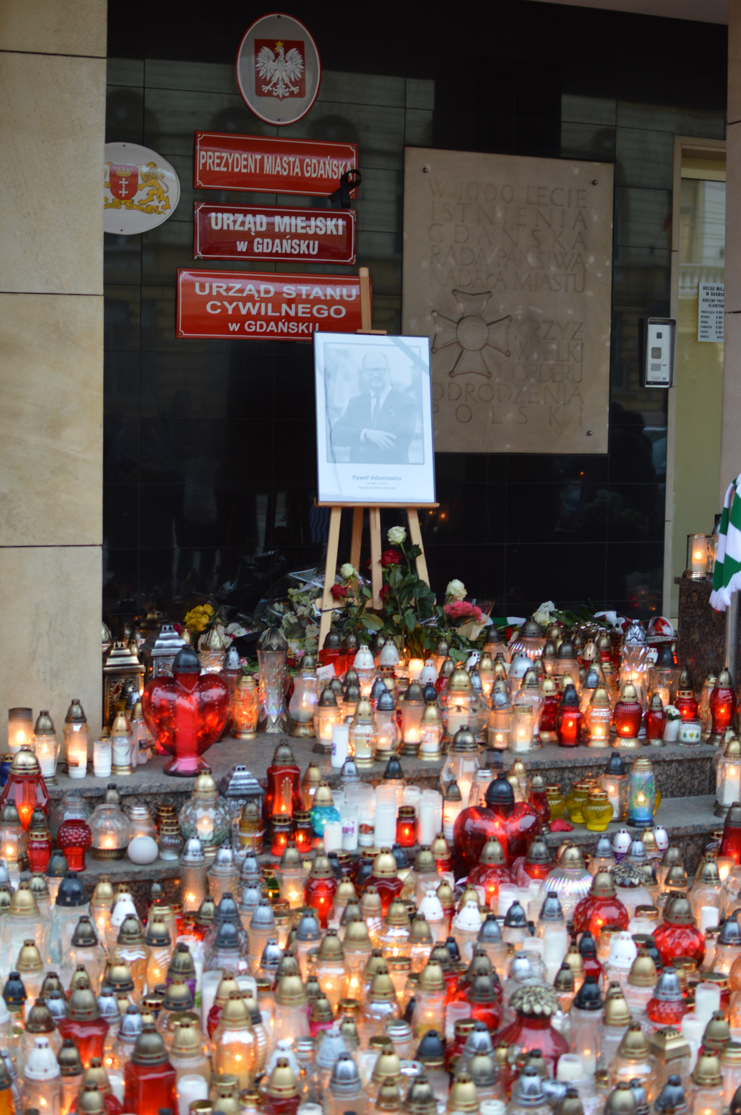 Urząd Miasta w Gdańsku, 15 stycznia 2019 - znicze od mieszkańców Gdańska